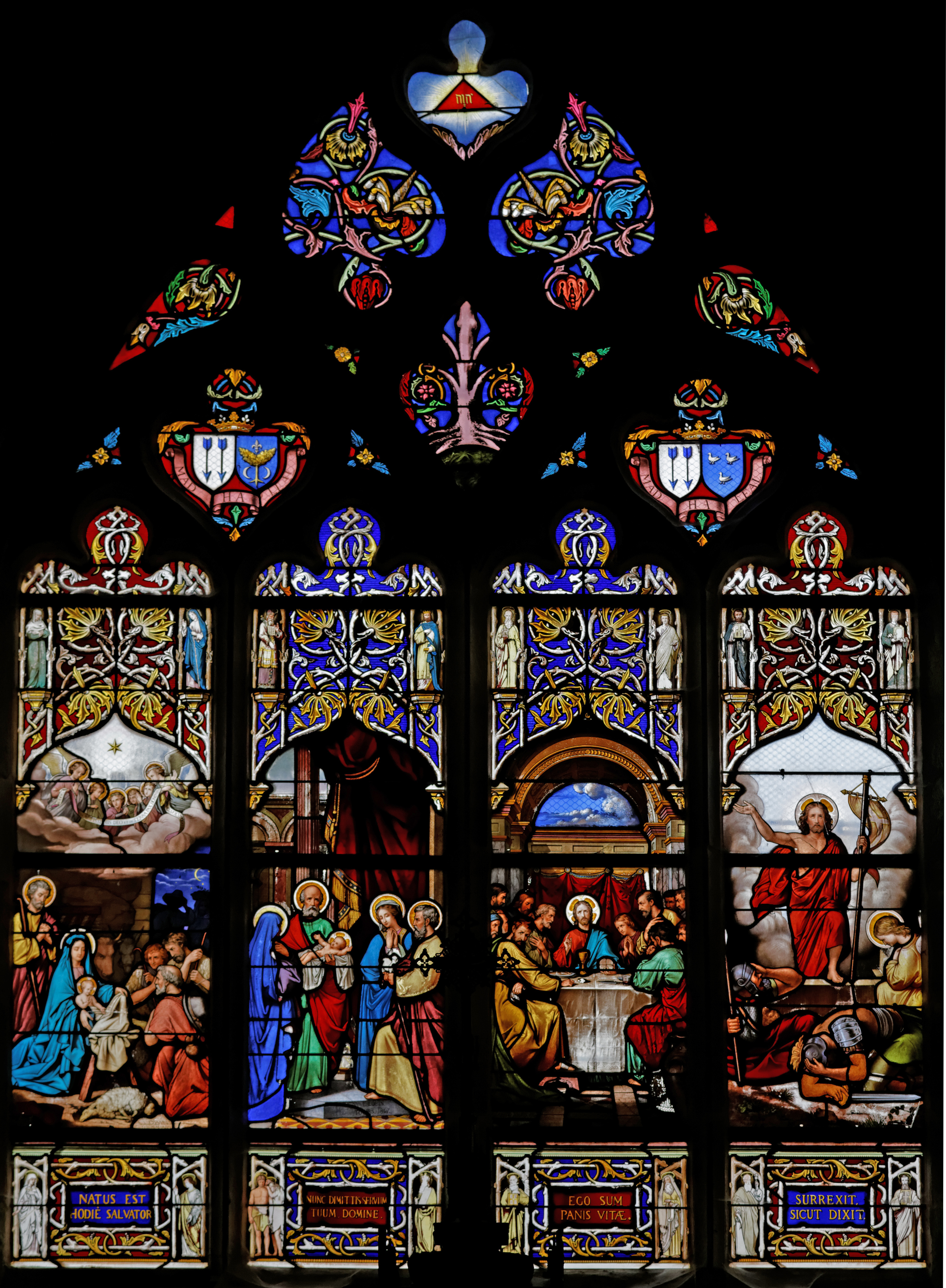 Vitrail représentant la Nativité, la Présentation au Temple, la Cène et la Résurrection (Lobin, Tours, 1867) au dessus de l'autel Est de la cathédrale Saint-Paul-Aurélien de Saint-Pol-de-Léon.